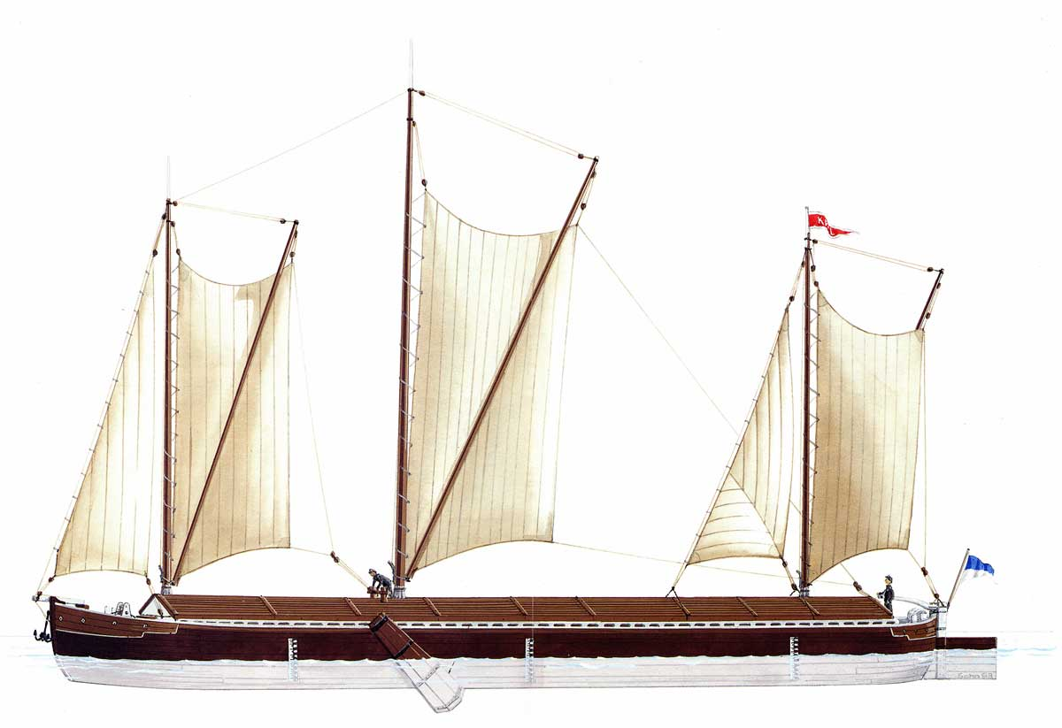 Pommerscher Segelkahn um 1910 vom Stettiner Haff